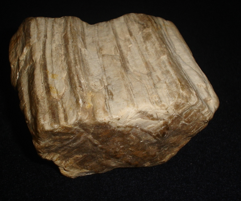 Madeira fossilizada (silicificada), origem:Santa Maria, Rio Grande do Sul, Brasil, madeira fóssil (10 x 12 cm)